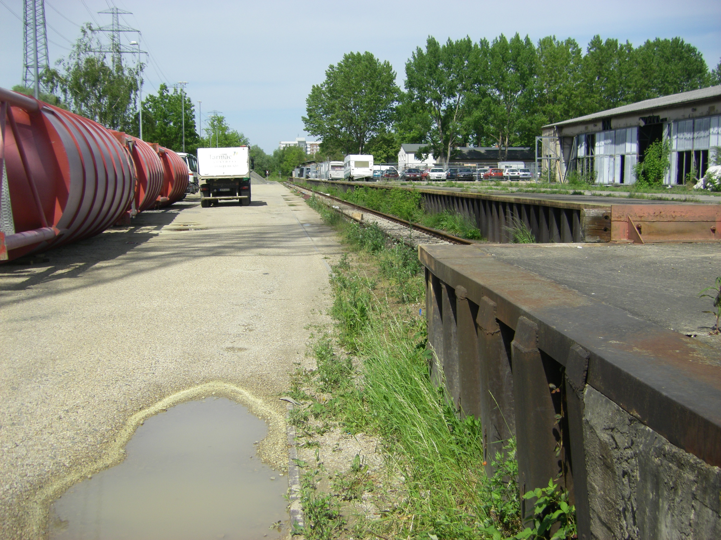 Verladerampe auf dem Gelände des Magerviehhofes Friedrichsfelde